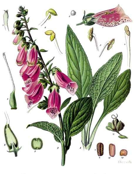 Roter Fingerhut. A B Pflanze in natürl. Grösse; 1 Blüthe im Längsschnitt, wenig vergrössert; 2 Staubgefäss, vergrössert; 3 und 4 dieselbe geöffnet, desgl.; 5 Pollen, desgl.; 6 Stempel, desgl.; 7 Griffel mit Narbe, desgl.; 8 Fruchtknoten im Längsschnitt, desgl.; 9 derselbe im Querschnitt, desgl.; 10 Frucht nat. Grösse; 11 Same, vergrössert; 12, 13 derselbe zerschnitten, desgl.